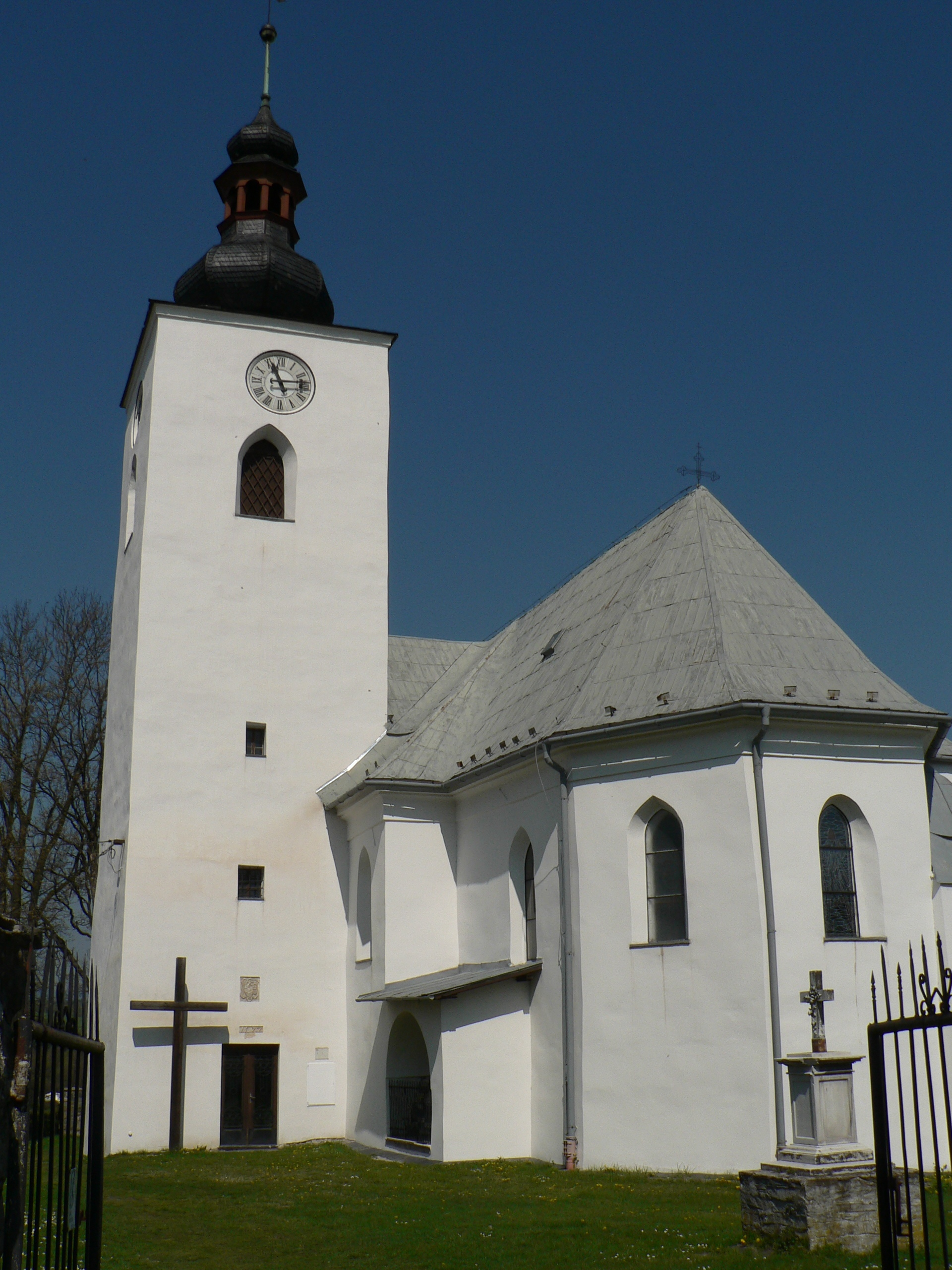 Kostel Tří králů (Břidličná)